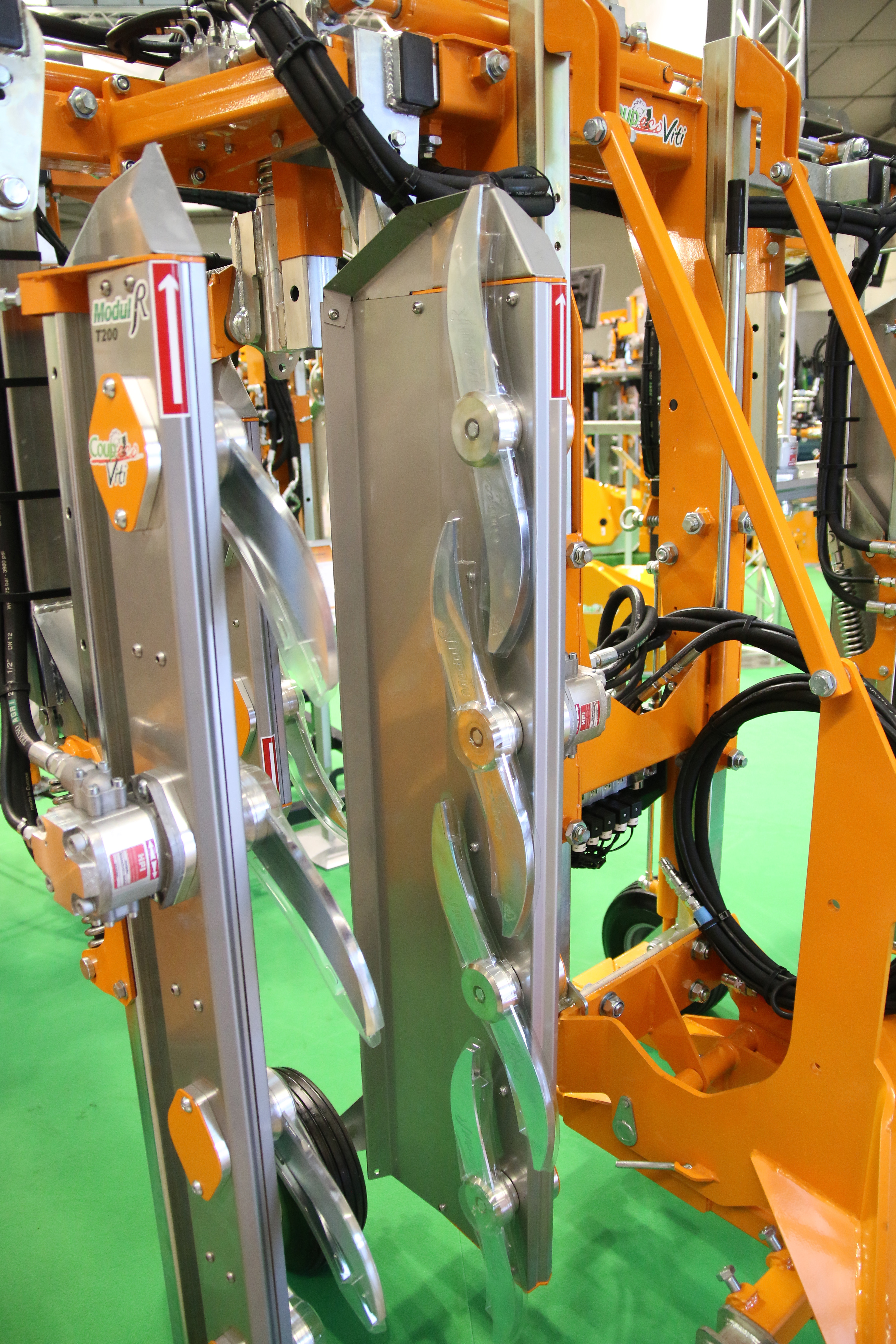 Rogneuse viticole